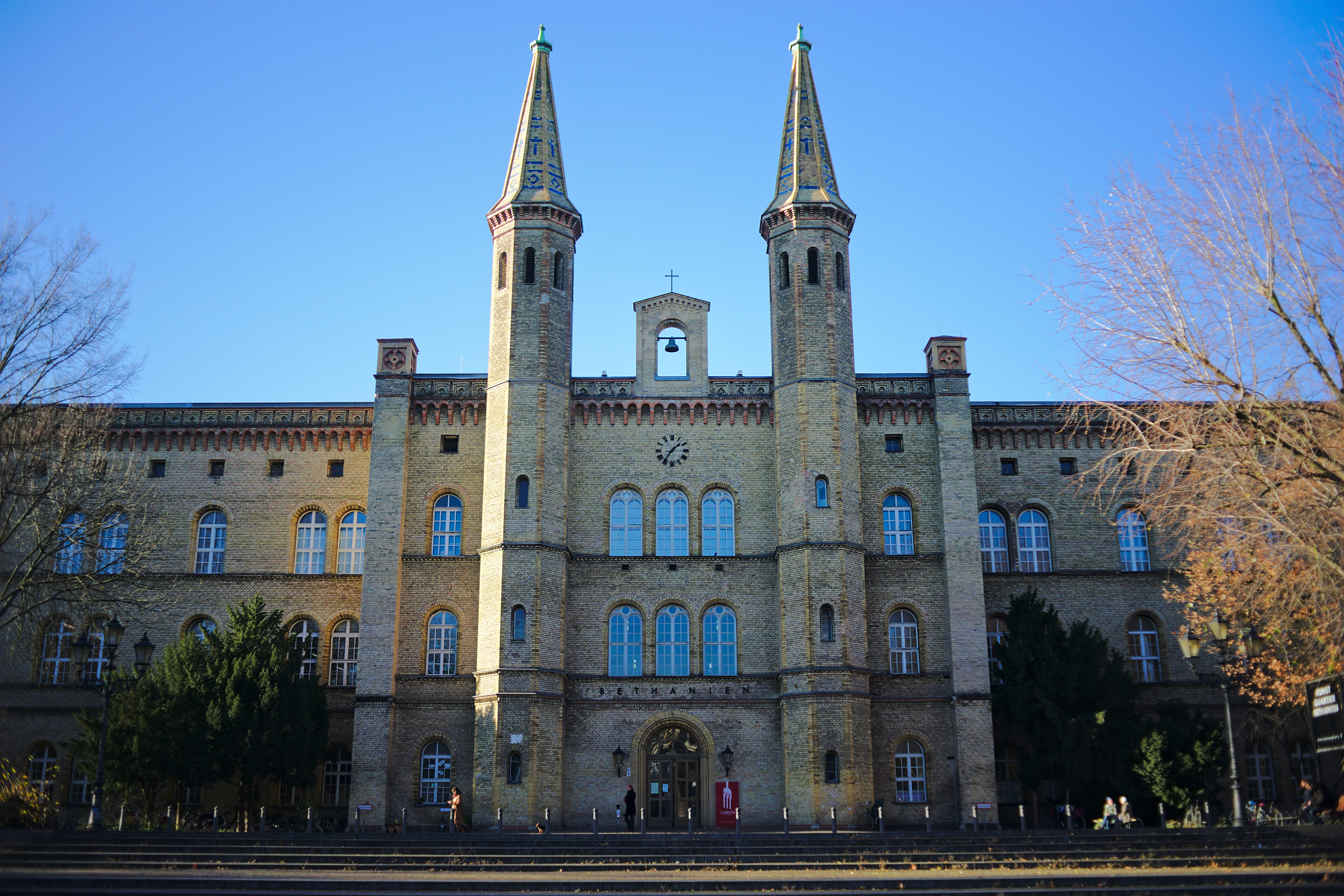 Künstlerhaus Bethanien